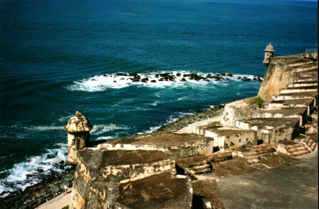 Guerites at Fort El Morro